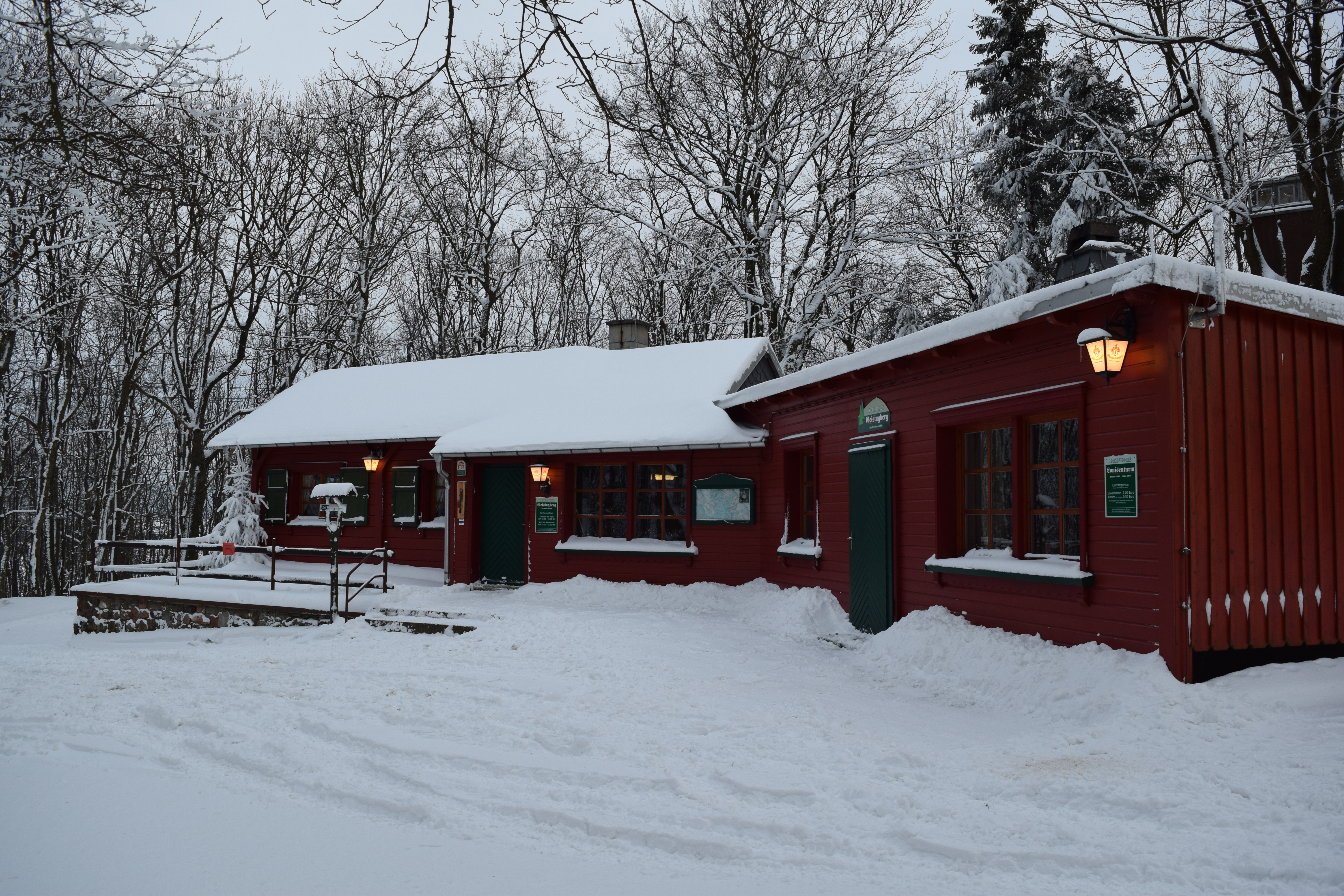 Bergbaude Geisingberg